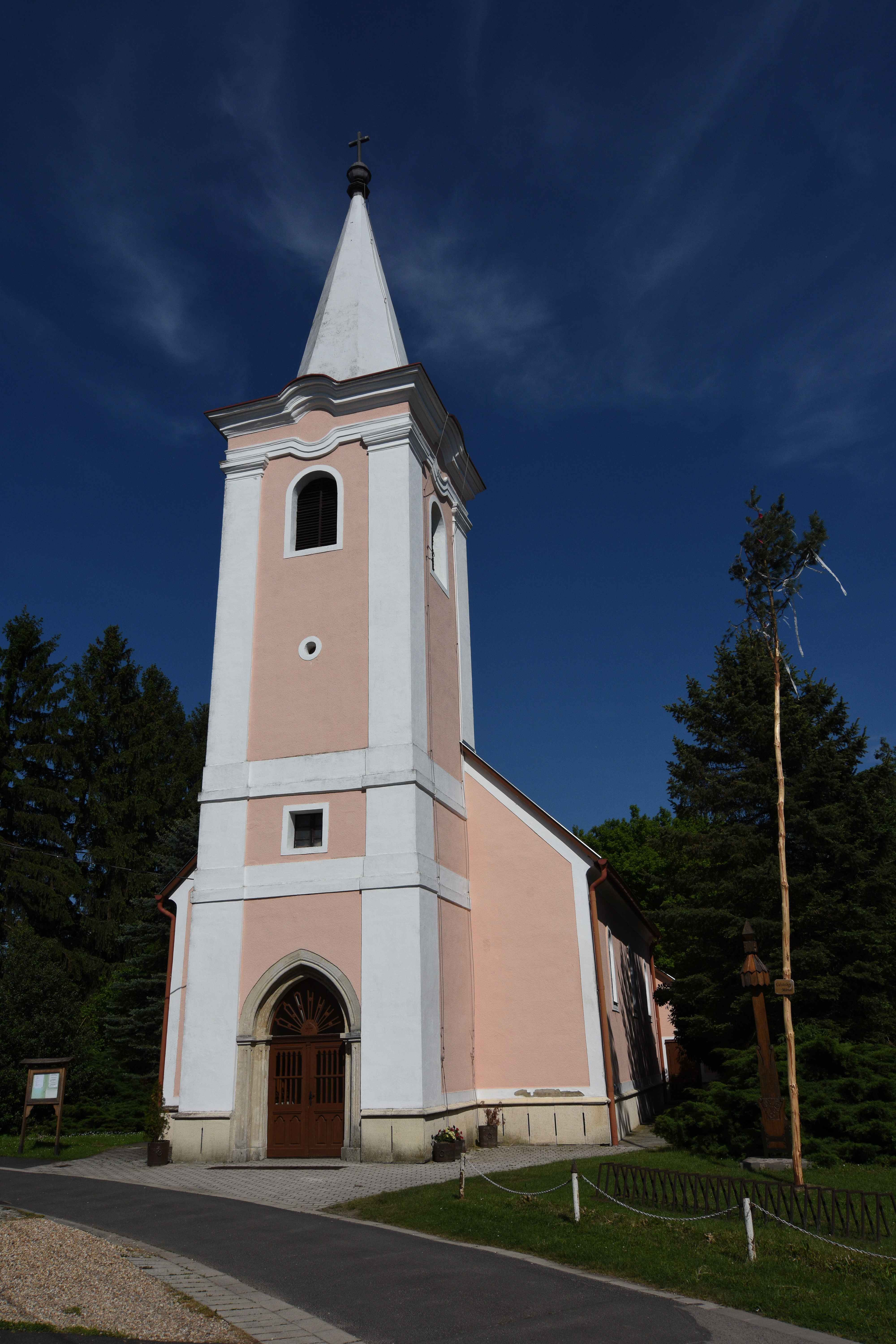 Roman Catholic Church in Ikervár